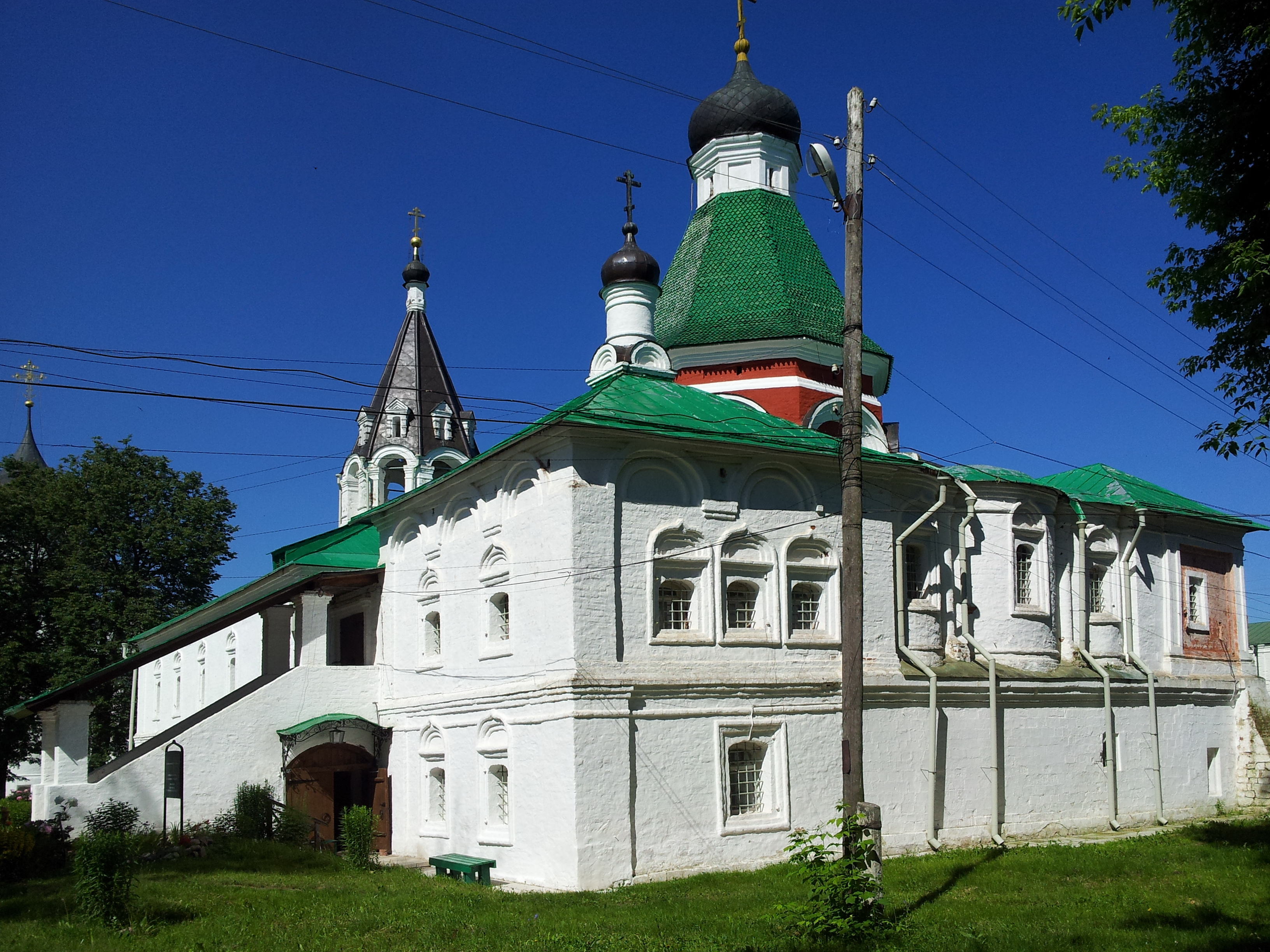 Церковь Покрова Пресвятой Богородицы (Владимирская область, Александров, Музейный проезд, 20)